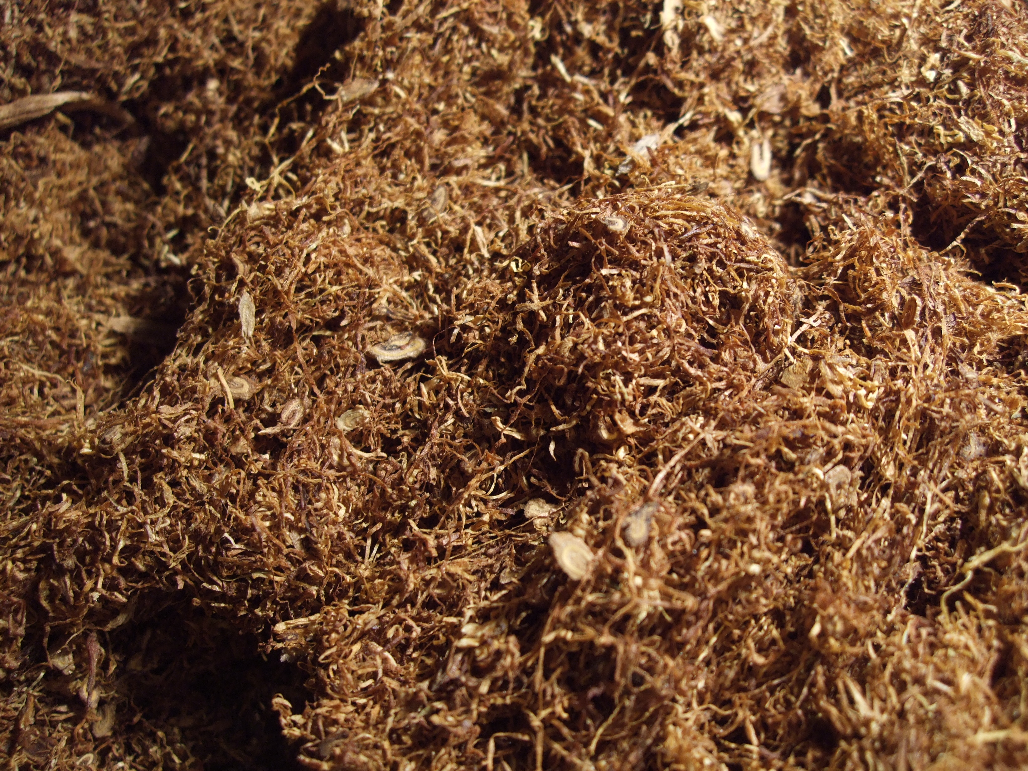 Tabac à Rouler blond de Virginie et de Burley